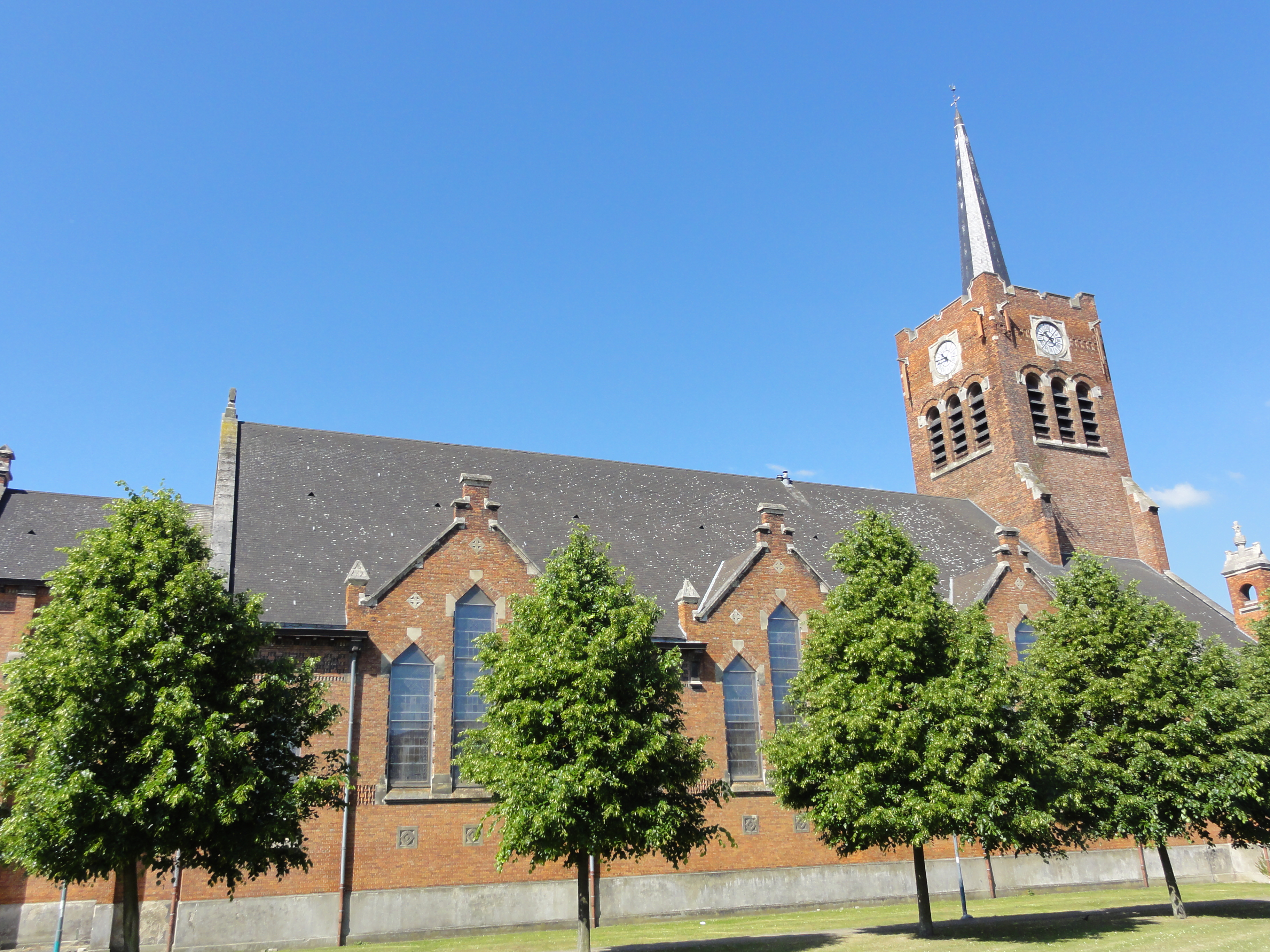 Église Notre-Dame des Mineurs des cités de la Fosse Notre Dame de la Compagnie des mines d'Aniche, Waziers, Nord, Nord-Pas-de-Calais, France.